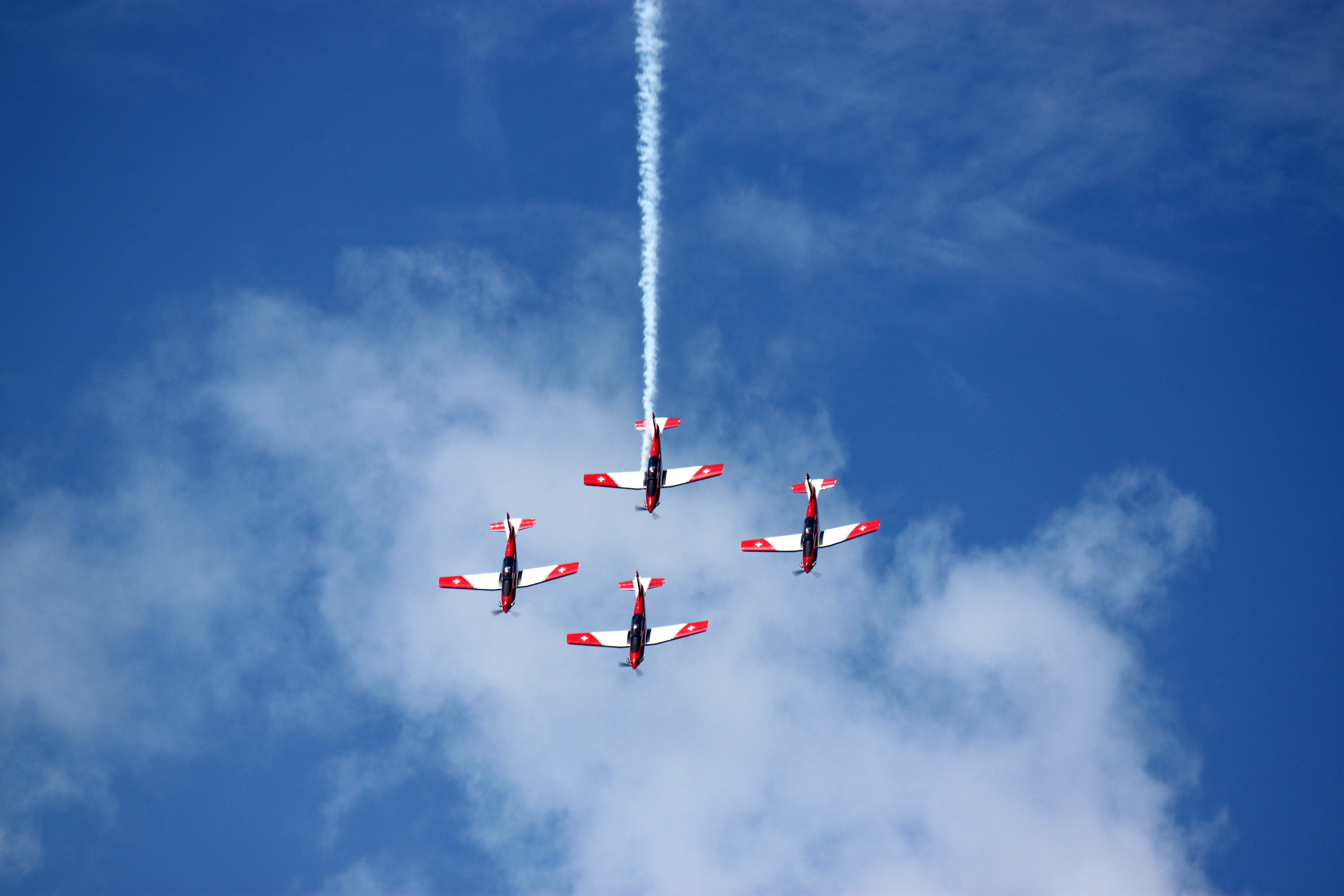 Schweizer Kunstflieger bei der AirPower16